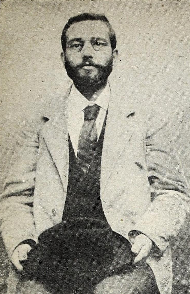 Retrato del asesino de Cánovas del Castillo (Michele Angiolillo).